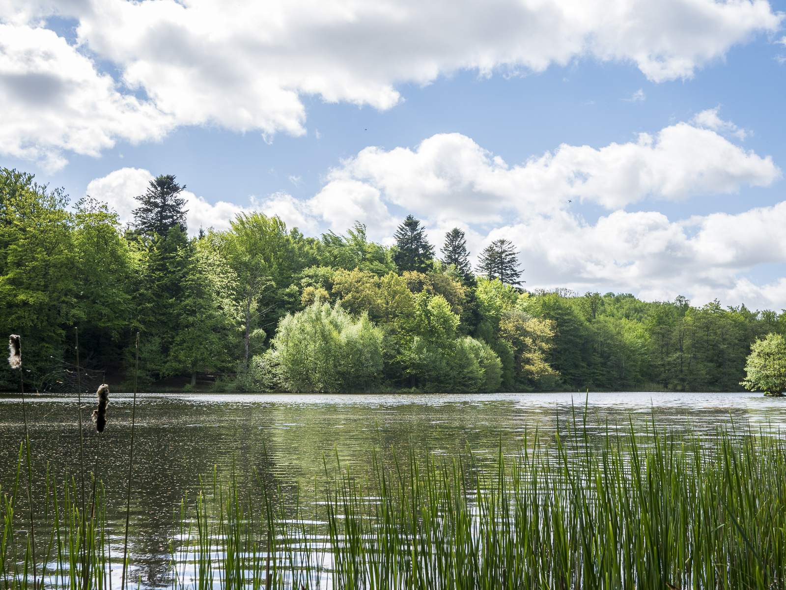 Hesede skov